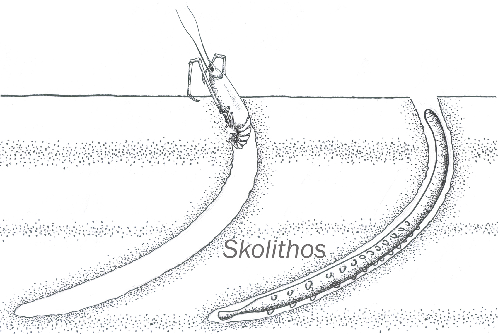 Imagen ilustrativa de cómo dos organismos diferentes pueden formar un mismo icnofósil. En este caso un pequeño artrópodo y un anélido forman las galerías denominadas Skolithos.